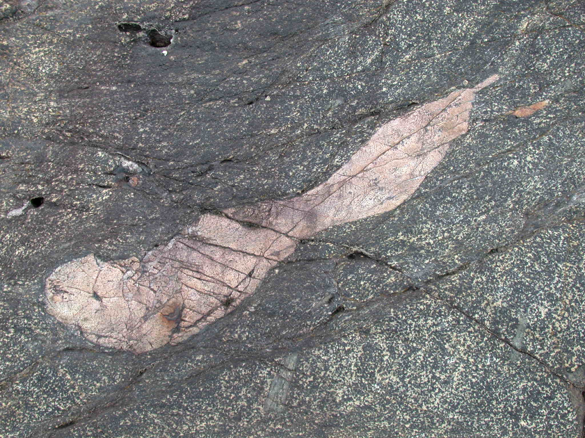 Xenolite, Läckö (Kållandsö), Sweden. Photo by Riggwelter, June 4, 2006.